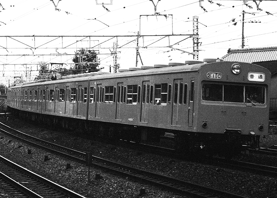 国鉄 103系 クハ103-154 先頭7両編成